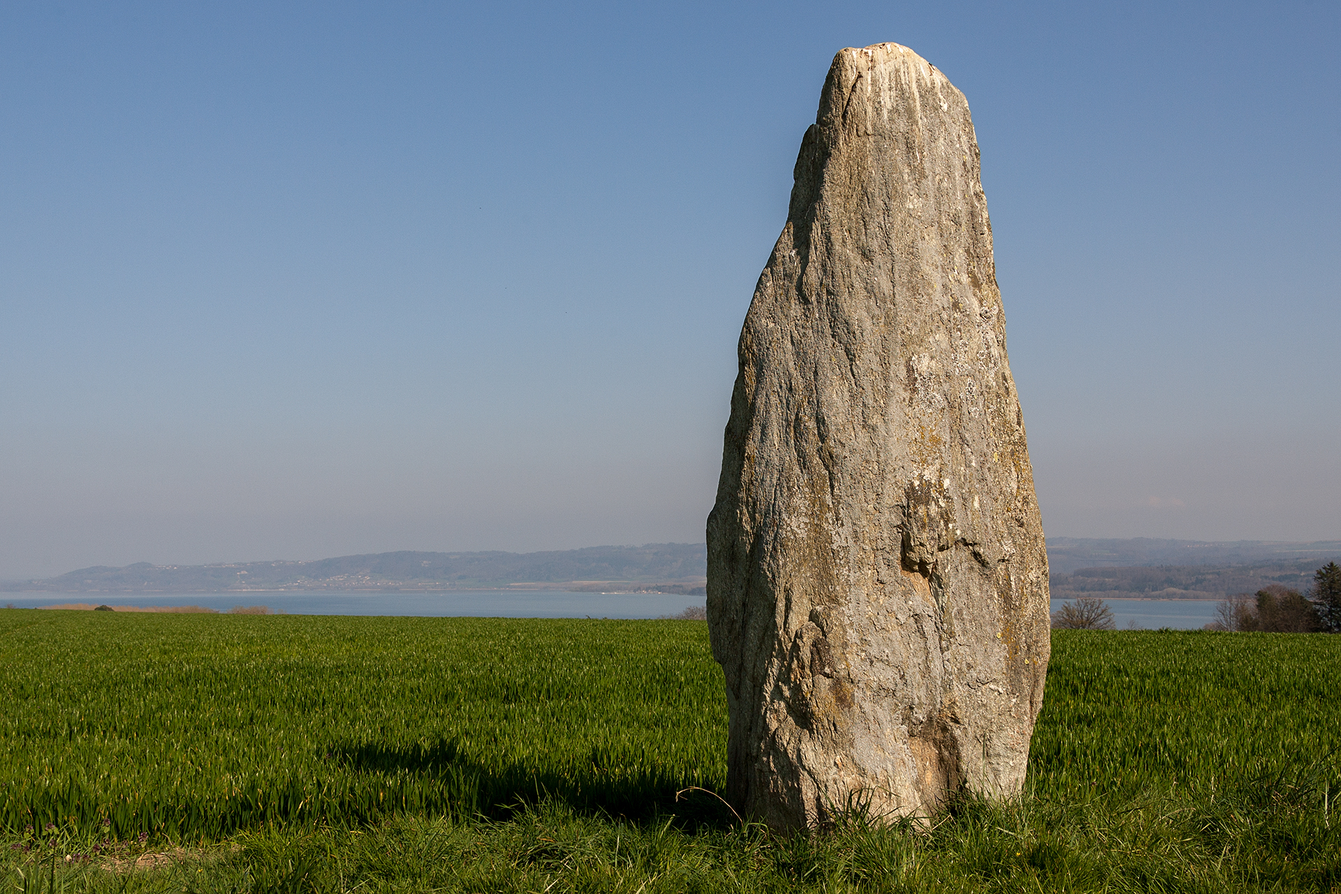 Menhier oberhalb von Grandson